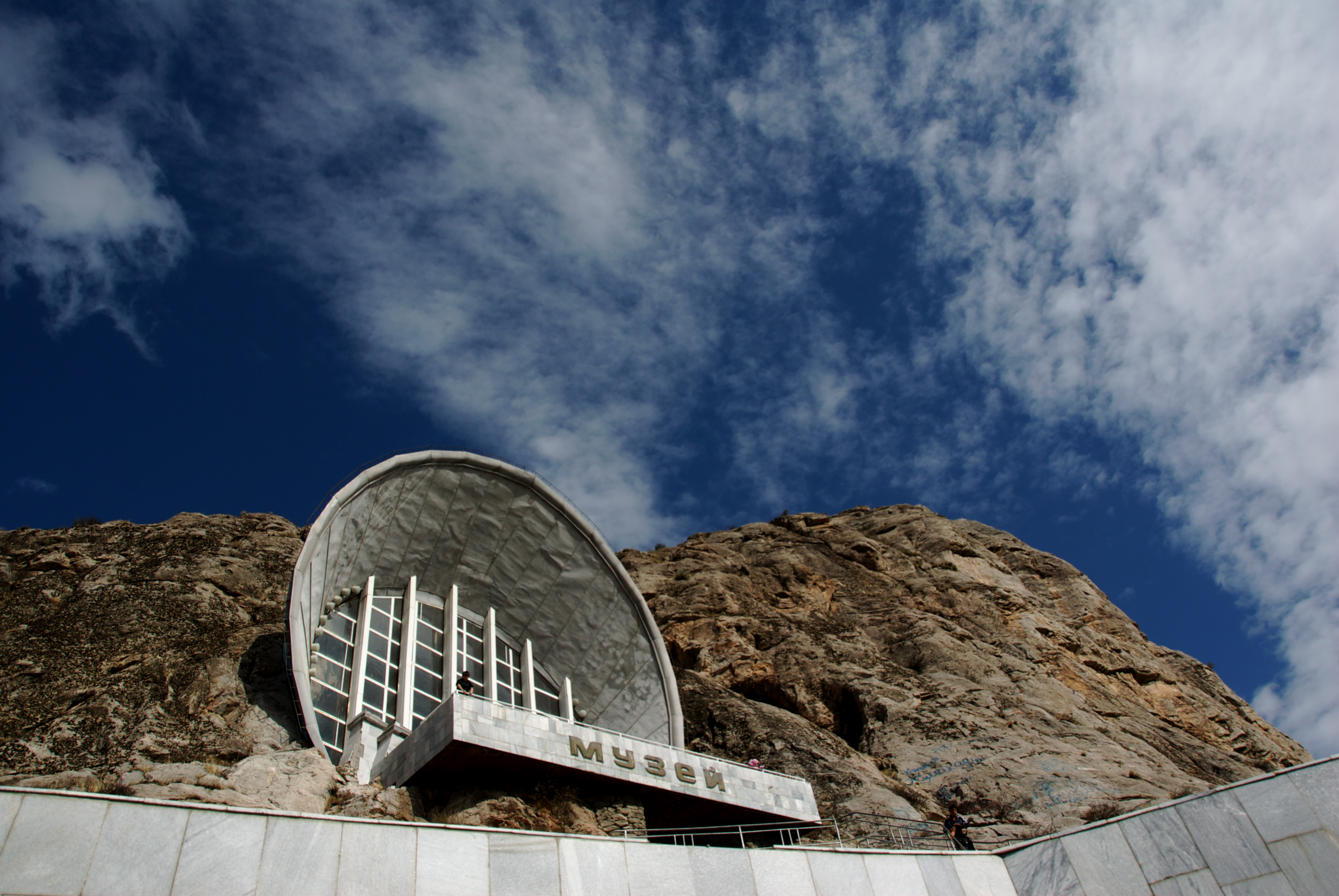 stans08-341